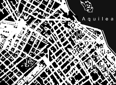 dibujo axonometrico sobre Aquilea, basado en imagenes vistas de la pelicula invasion, de hugo santiago trabajo propio 2007